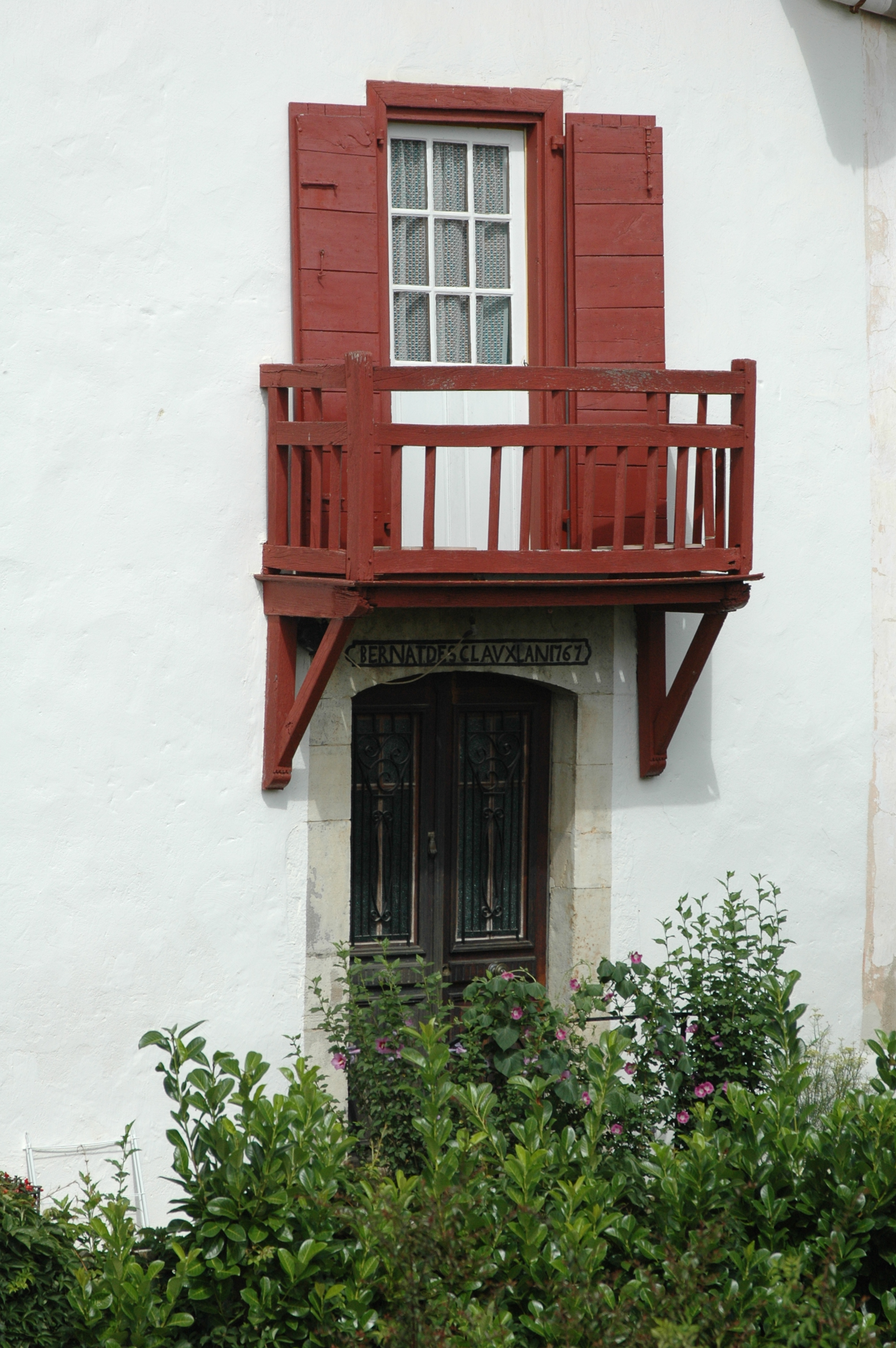 Masparraute, linteau décoré